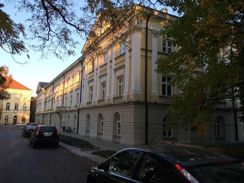 Dawna siedziba Wydzialu Teologii Ewangelickiej Uniwersytetu Warszawskiego przy ul. Krakowskie Przedmiescie